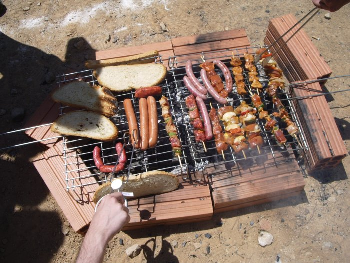 Fent una barbacoa a dues mans!